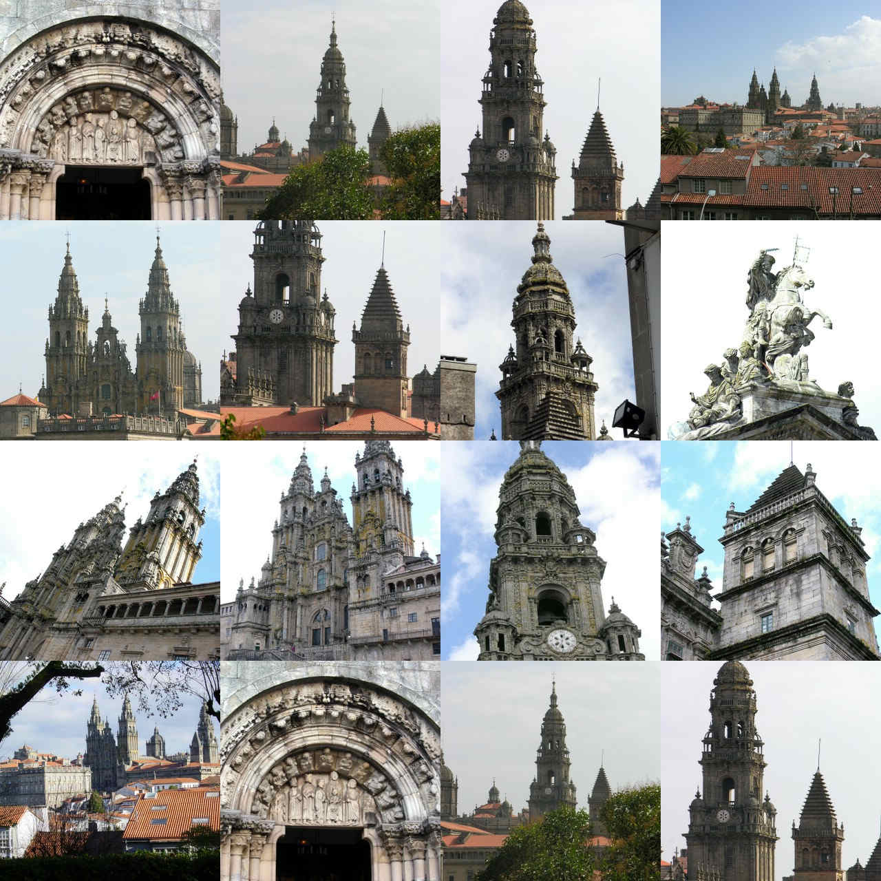 As fotos empregadas para desenvolver o presente collage están en Santiago de Compostela e teñen copyright GFDL. maioritariamente foron subidas por User:lmbuga. Santiago de Compostela - Galicia - Spain.